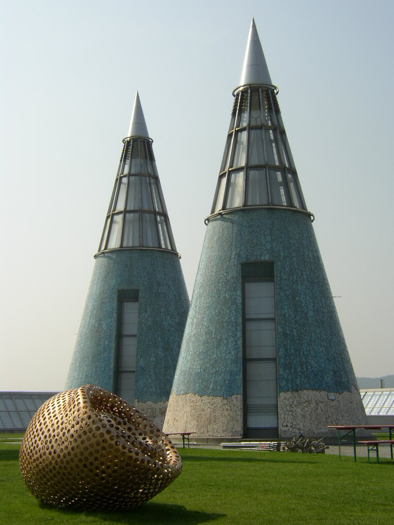 Lichtschächte der Bundeskunsthalle in Bonn, arch. Gustav Peichl